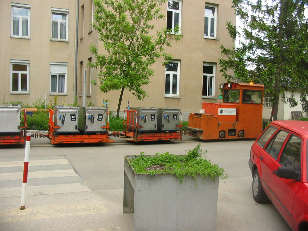 Narrow gauge railroad (Feldbahn) in Geriatriezentrum Lainz, Vienna, Austria